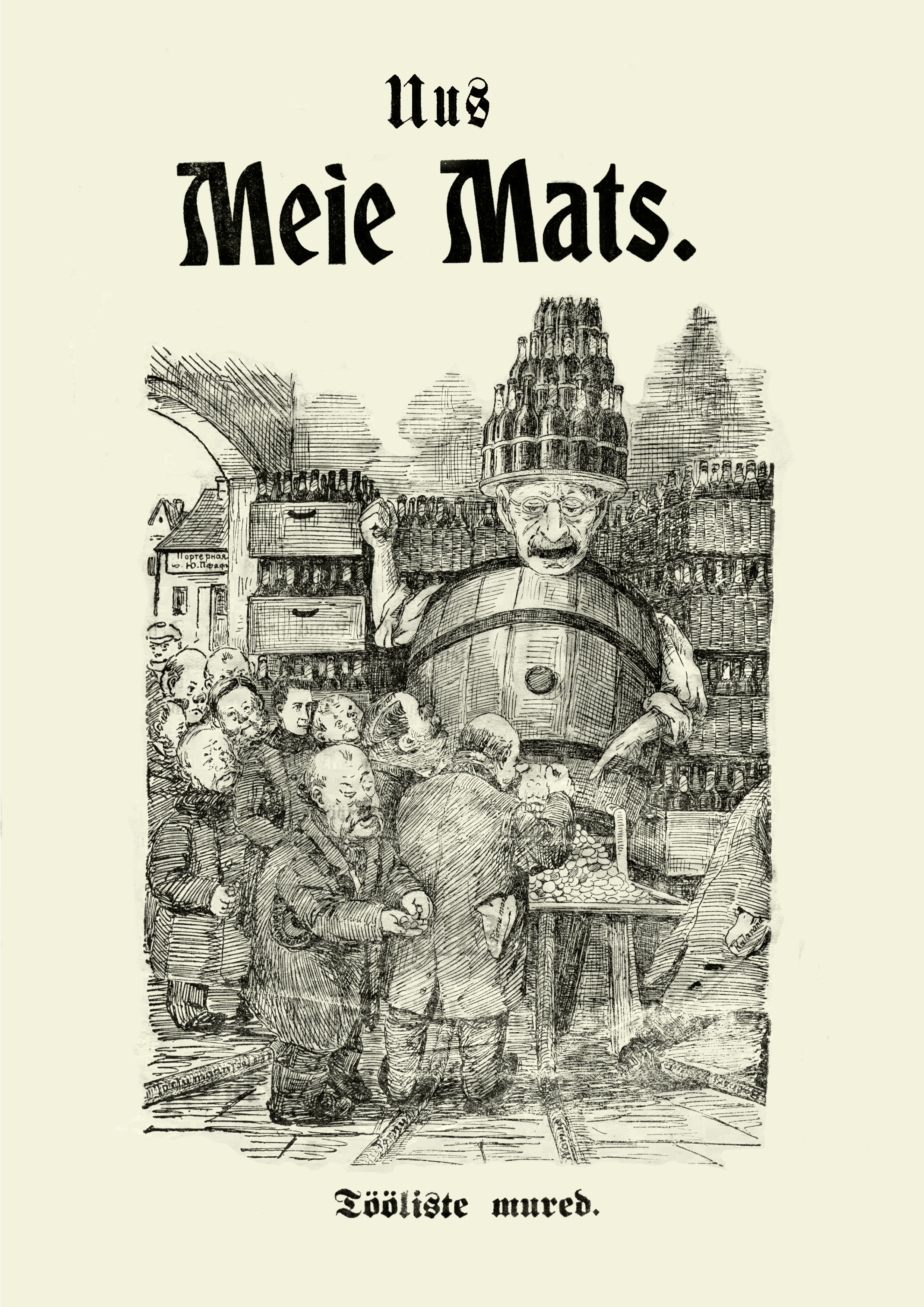 Ajakirja Uus Meie Mats esikaas, toimetaja Laurmann